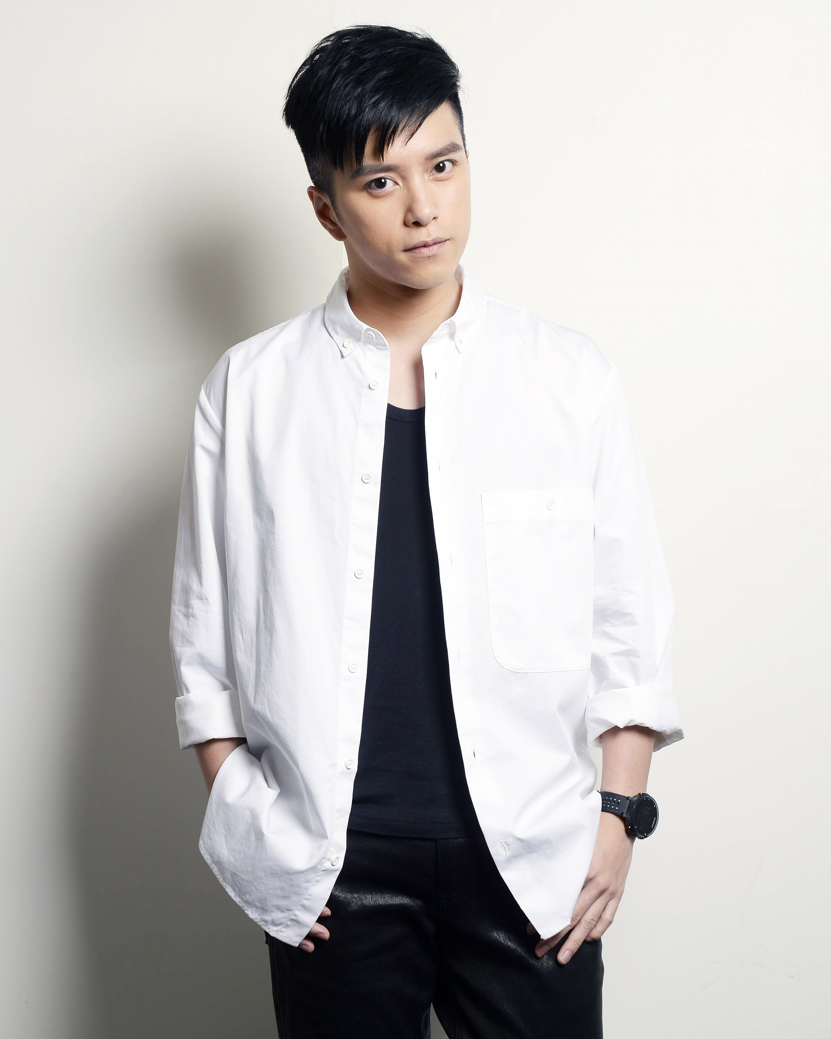 中文（香港）: 邦彥揚韻徹平疇，博識昭心闖俗流。